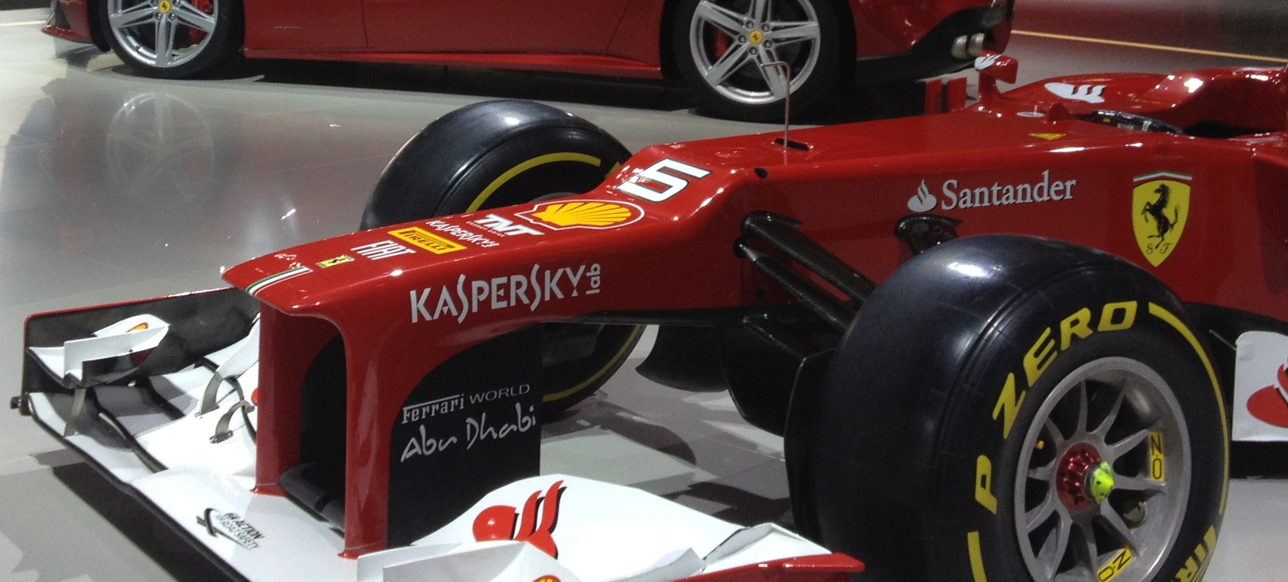 Primo piano dello "scalino" (stepped nose) presente sul muso della Ferrari F2012, conseguenza delle direttive per la stagione 2012 circa la progettazione delle monoposto di Formula 1.